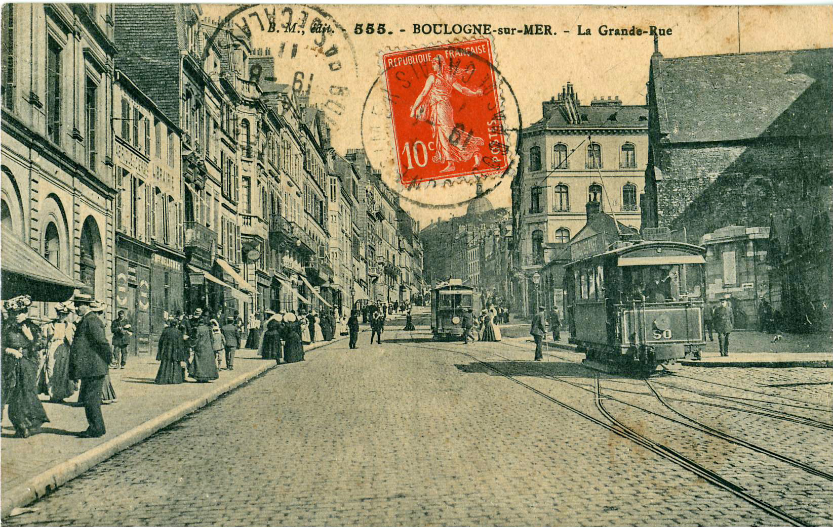 Carte postale ancienne éditée par B. M., n°555 : BOULOGNR-SUR-MER - La Grande RueVue en gros plan de la motrice n°50 du tramway électrique de Boulogne